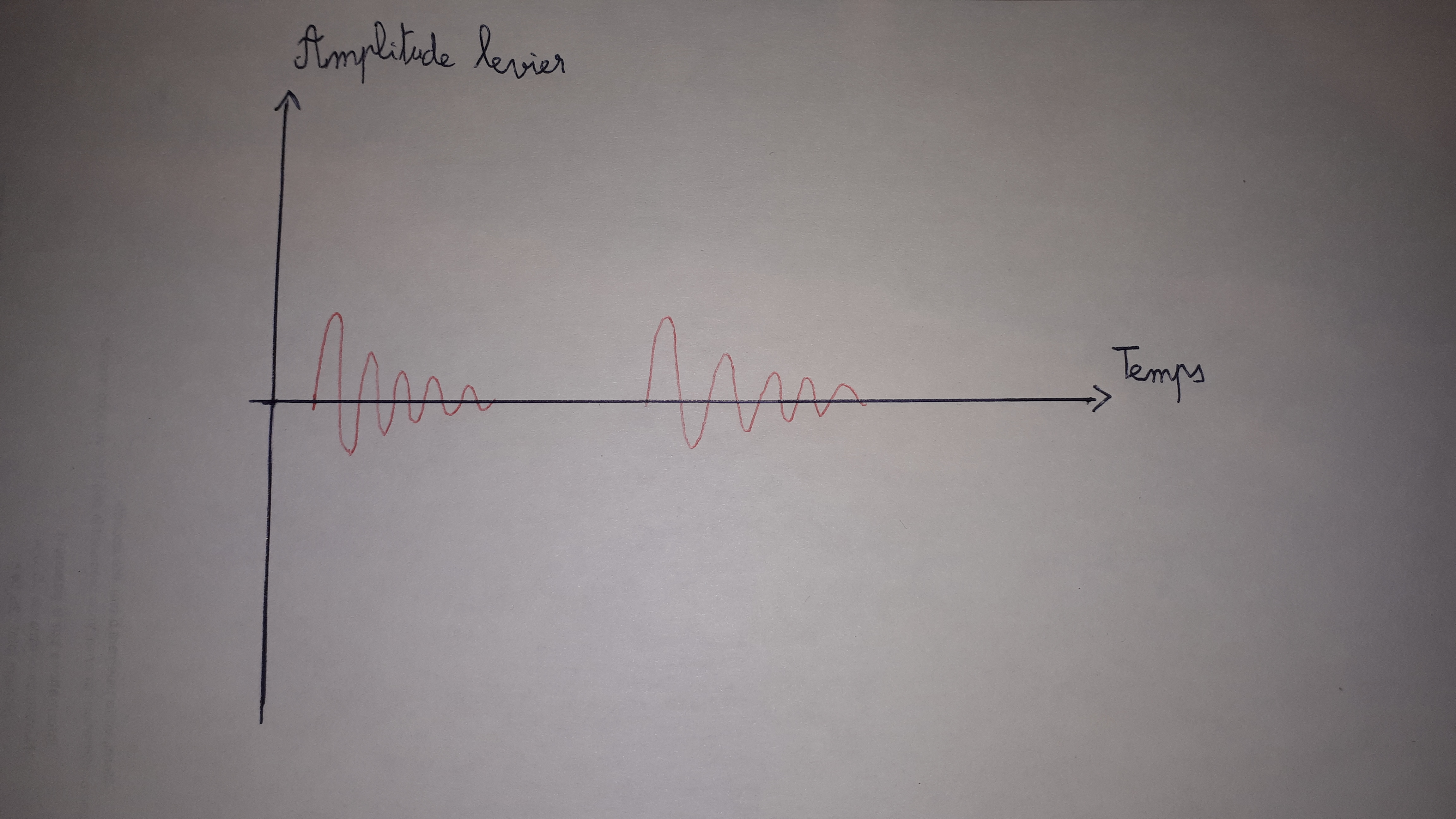 Un dessin théorique sur le signal obtenu par l'AFM-IR en mode "Contact" simple. Une image provenant d'un AFM-IR est bienvenue.